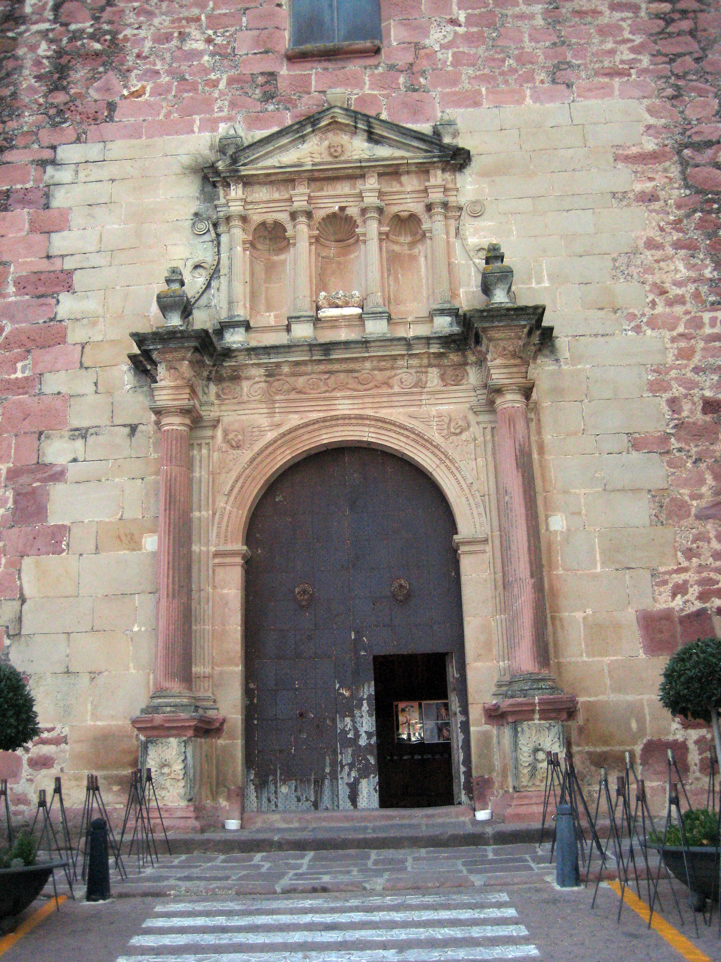 Portada de l'església de l'Assumpció de Vilafamés (Plana Alta)